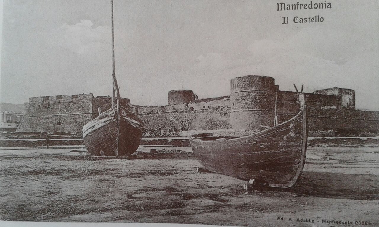 Panoramica del castello di Manfredonia. 1905